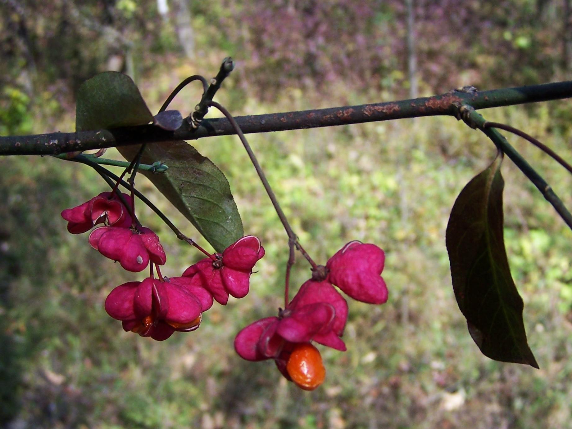 Euonymus europaeus (pl. trzmielina pospolita)